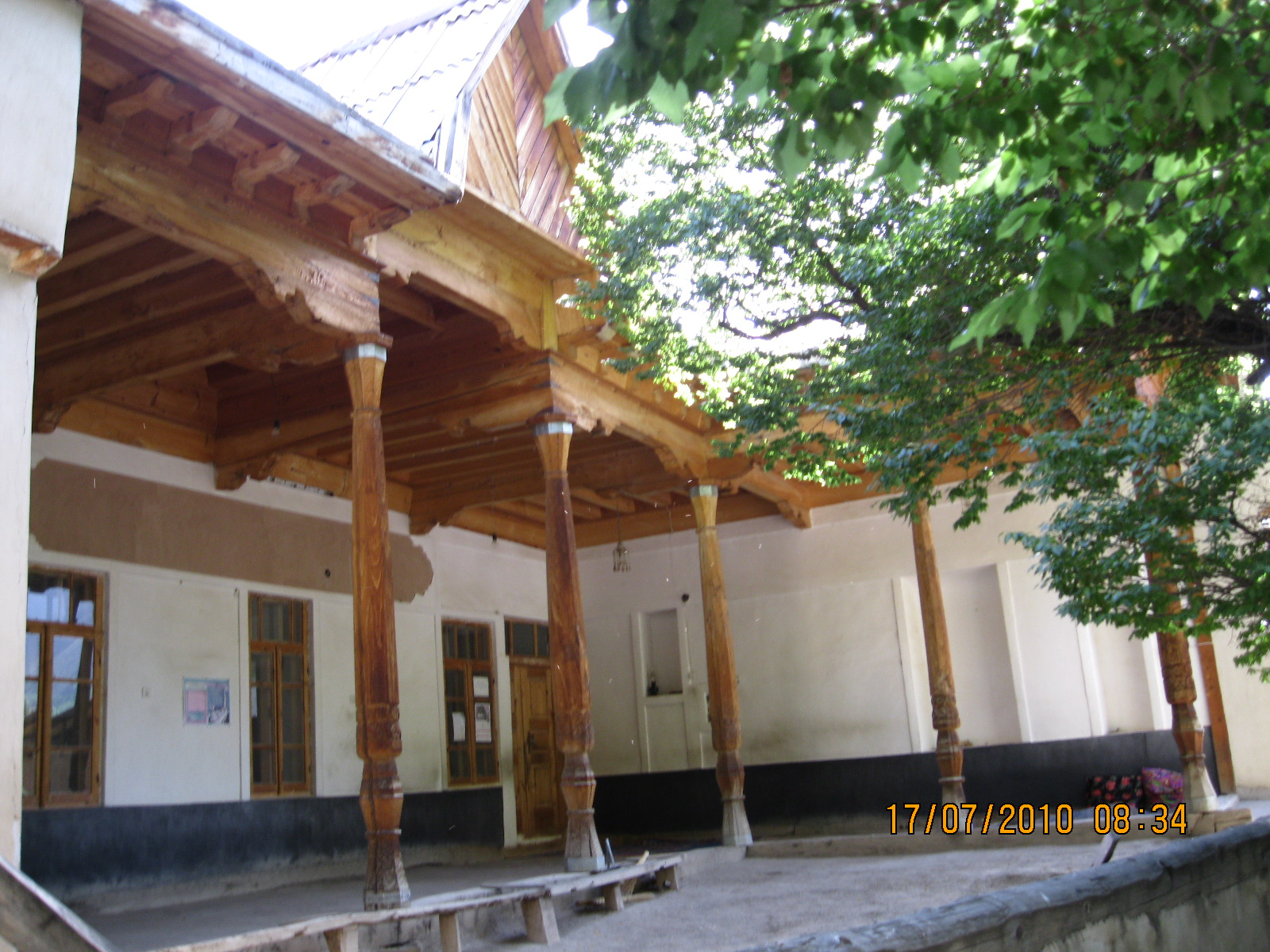 Тоҷикӣ: Масҷиди Каздон